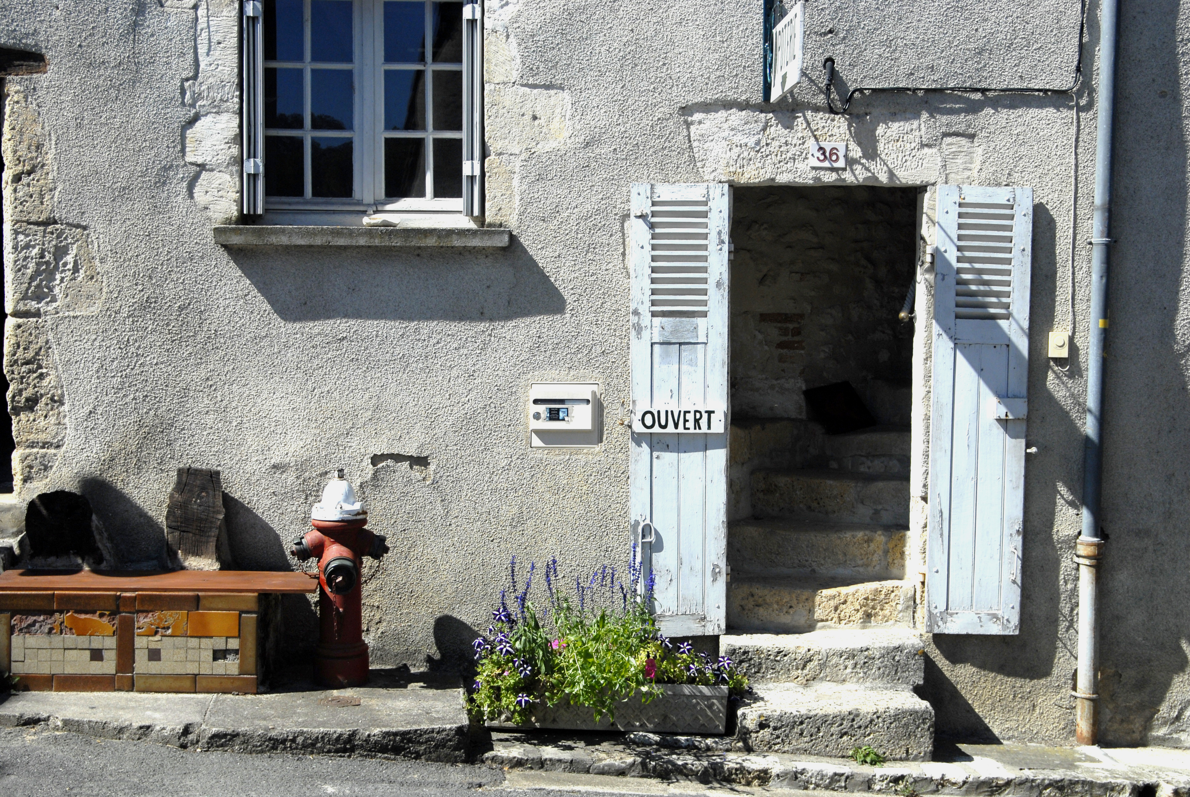 Angles-sur-l'Anglin, Hauseingang geöffnet